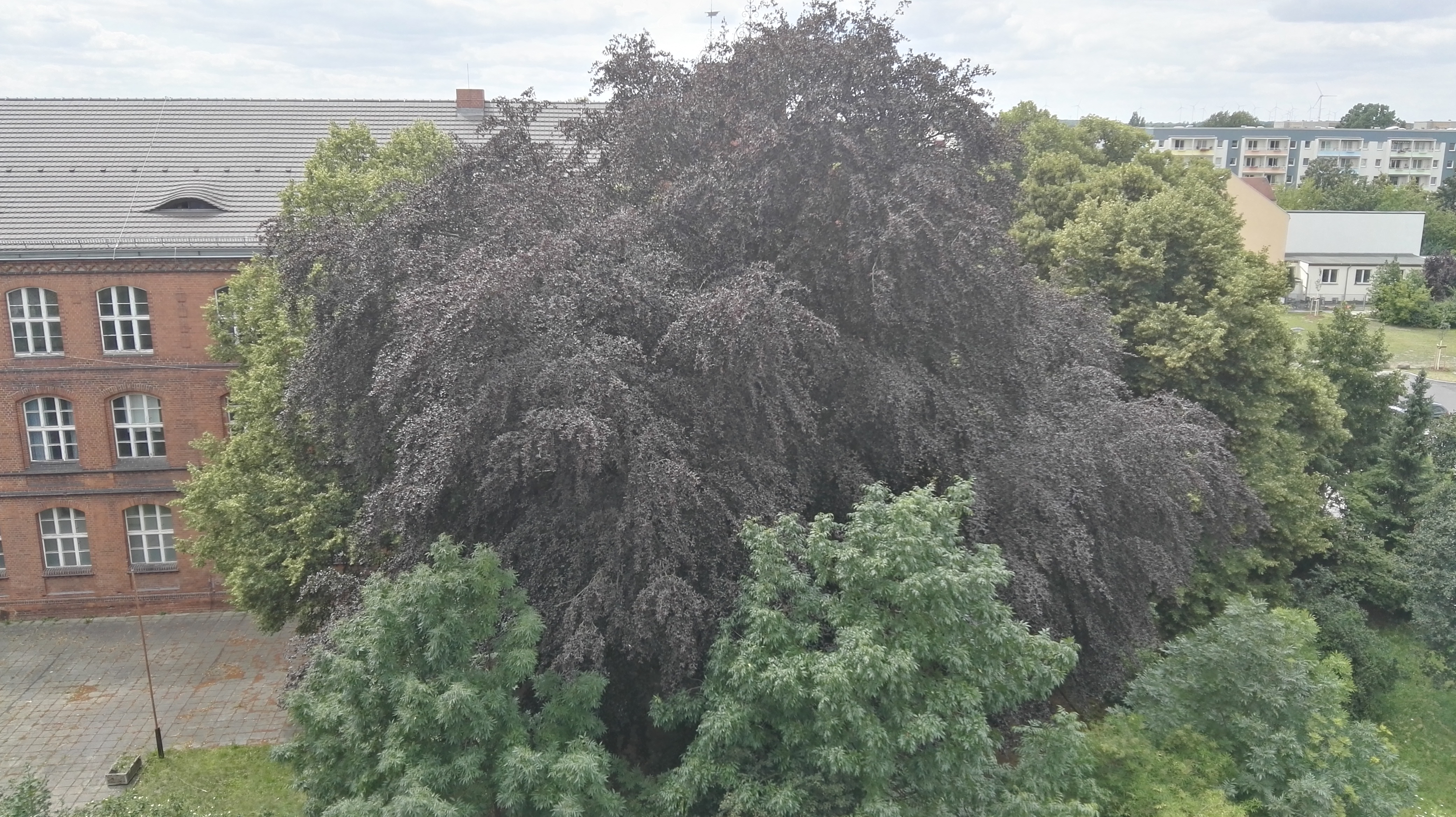 Naturdenkmal in Senftenberg Nr. 0100-1; Blutbuche (Fagus sylvatica "Purpurea") auf Schulhof der ehemaligen Realschule, Ecke Schulstraße/Bergbaustraße